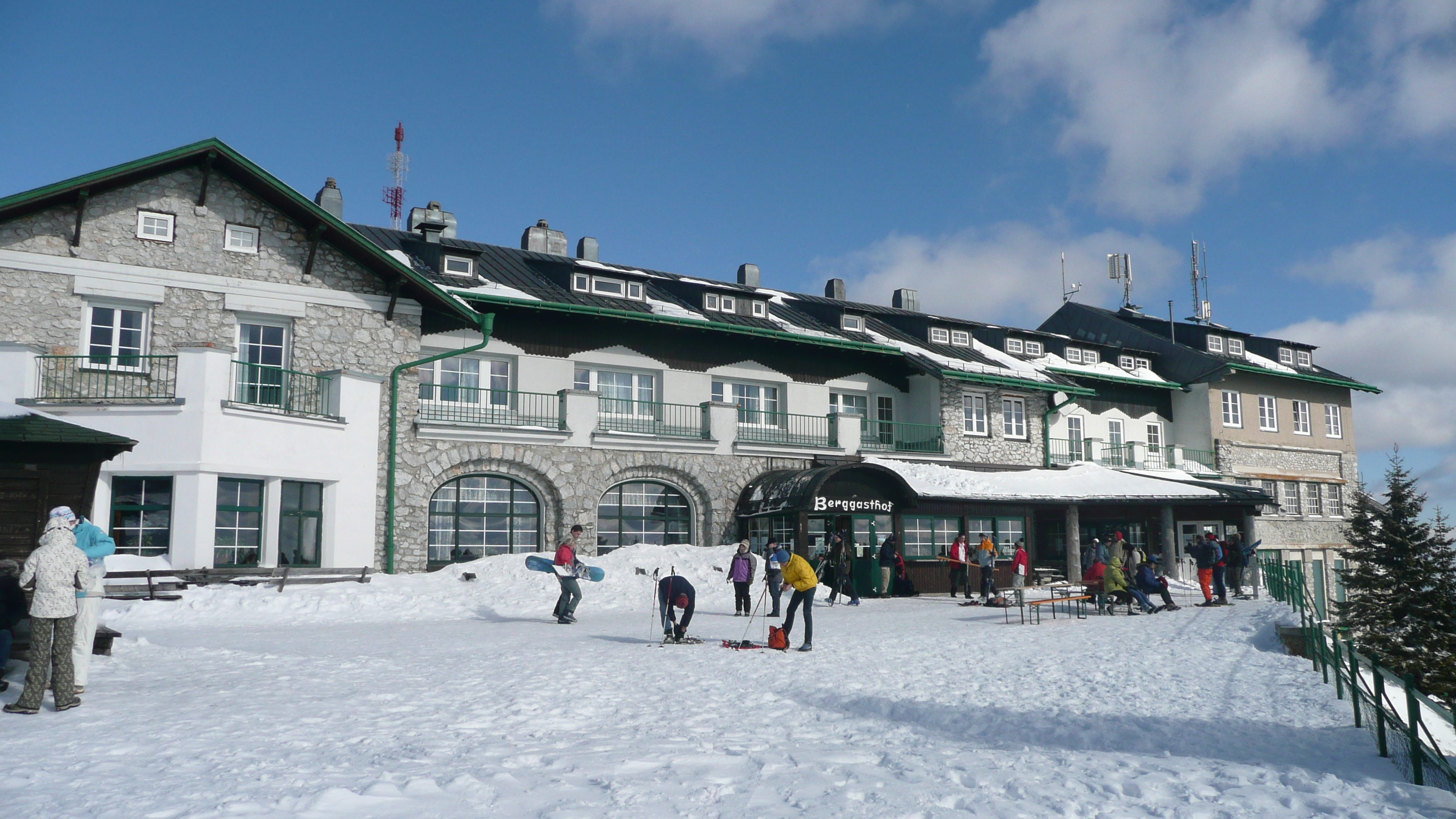 Bergstation der Raxseilbahn mit Gasthof